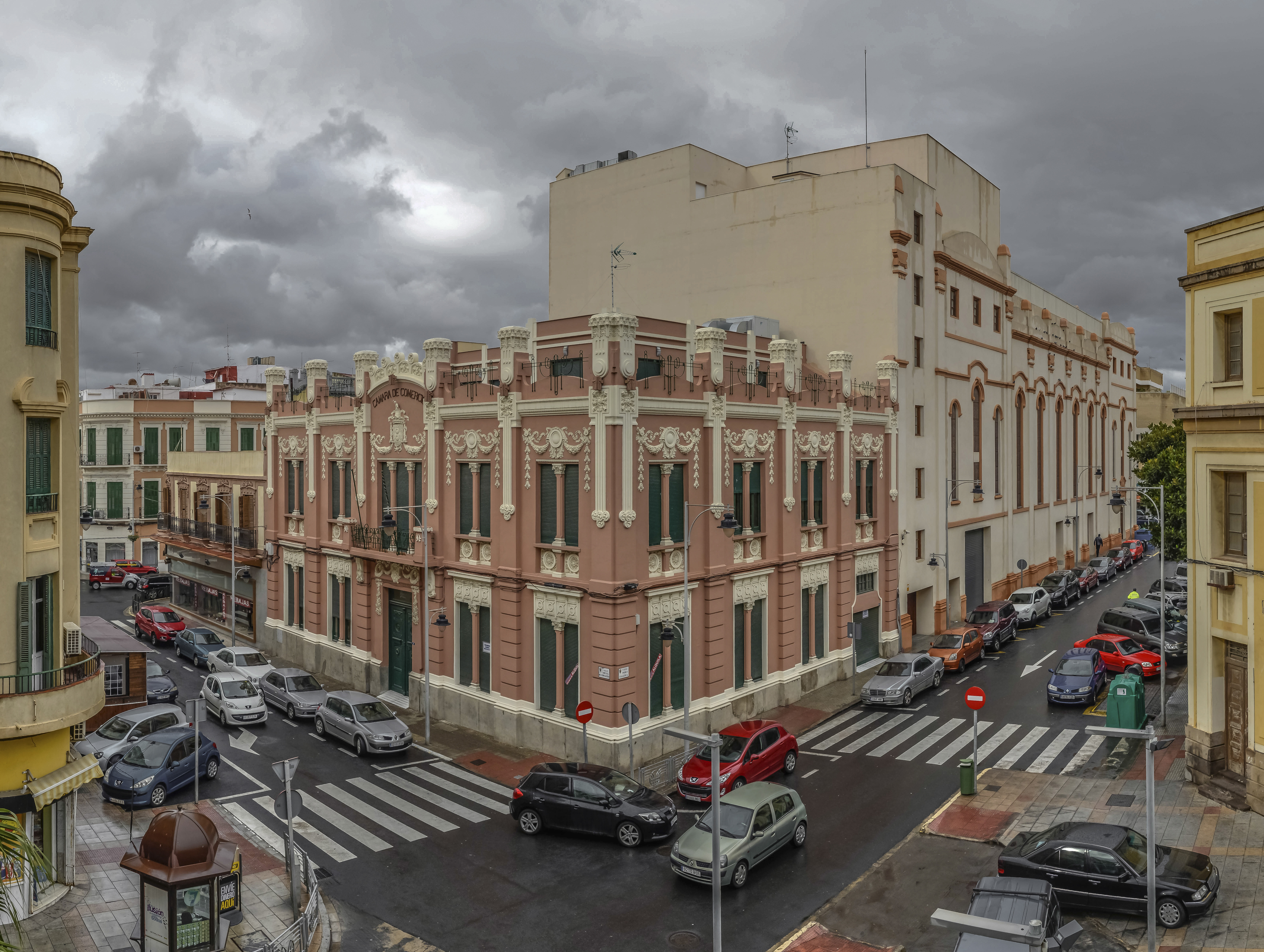 EDIFICIO DE LA CÁMARA DE COMERCIO, INDUSTRIA Y NAVEGACIÓN. Melilla (España) Arquitecto: Enrique Nieto. Proyecto: 1913. Inauguración: 1915.